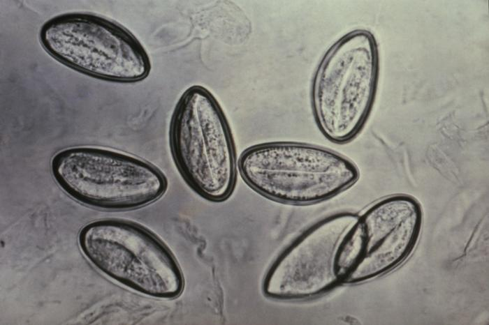 z